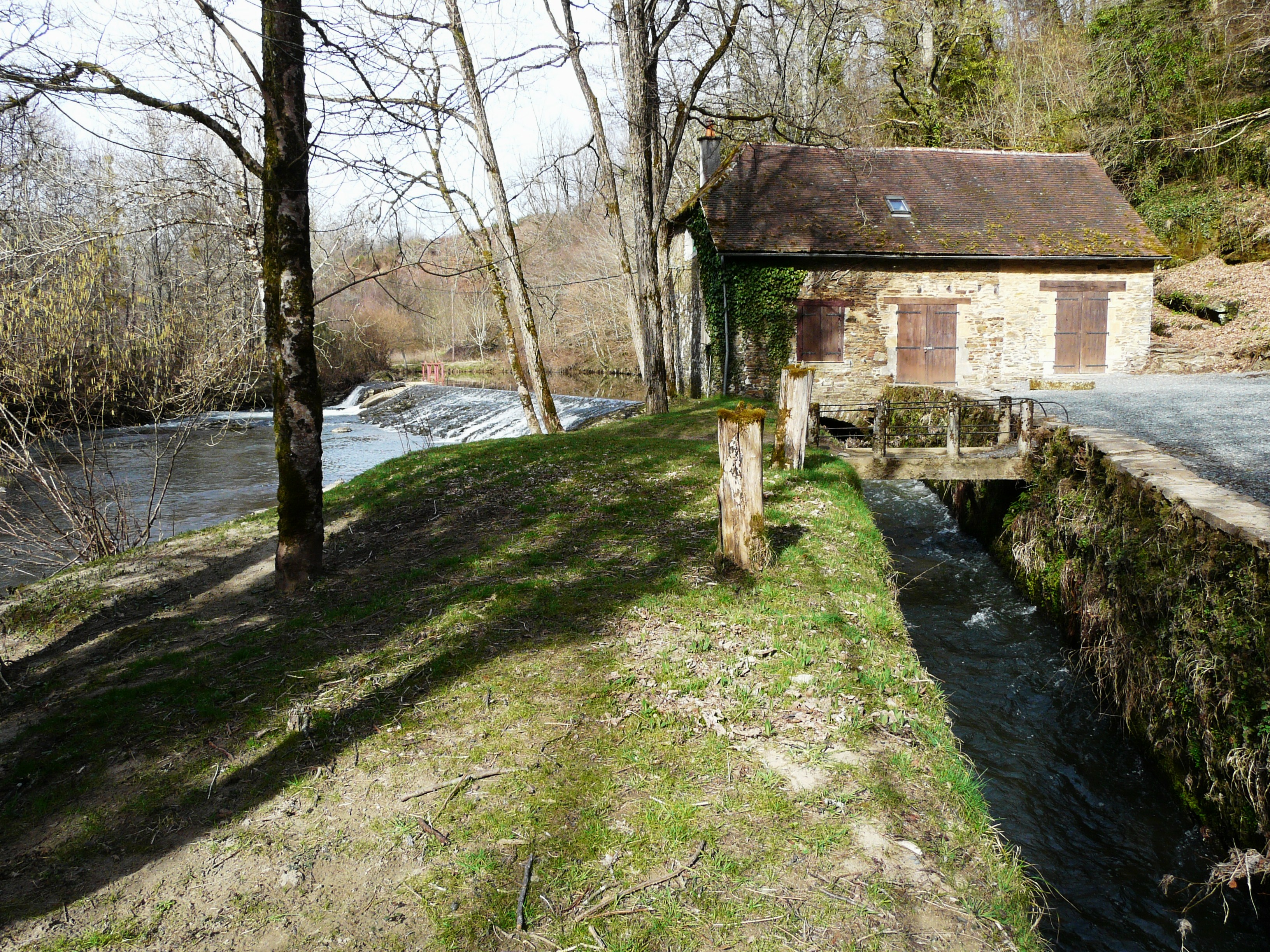 Le moulin de la Papeterie sur l'Auvézère, Beyssenac, Corrèze, France